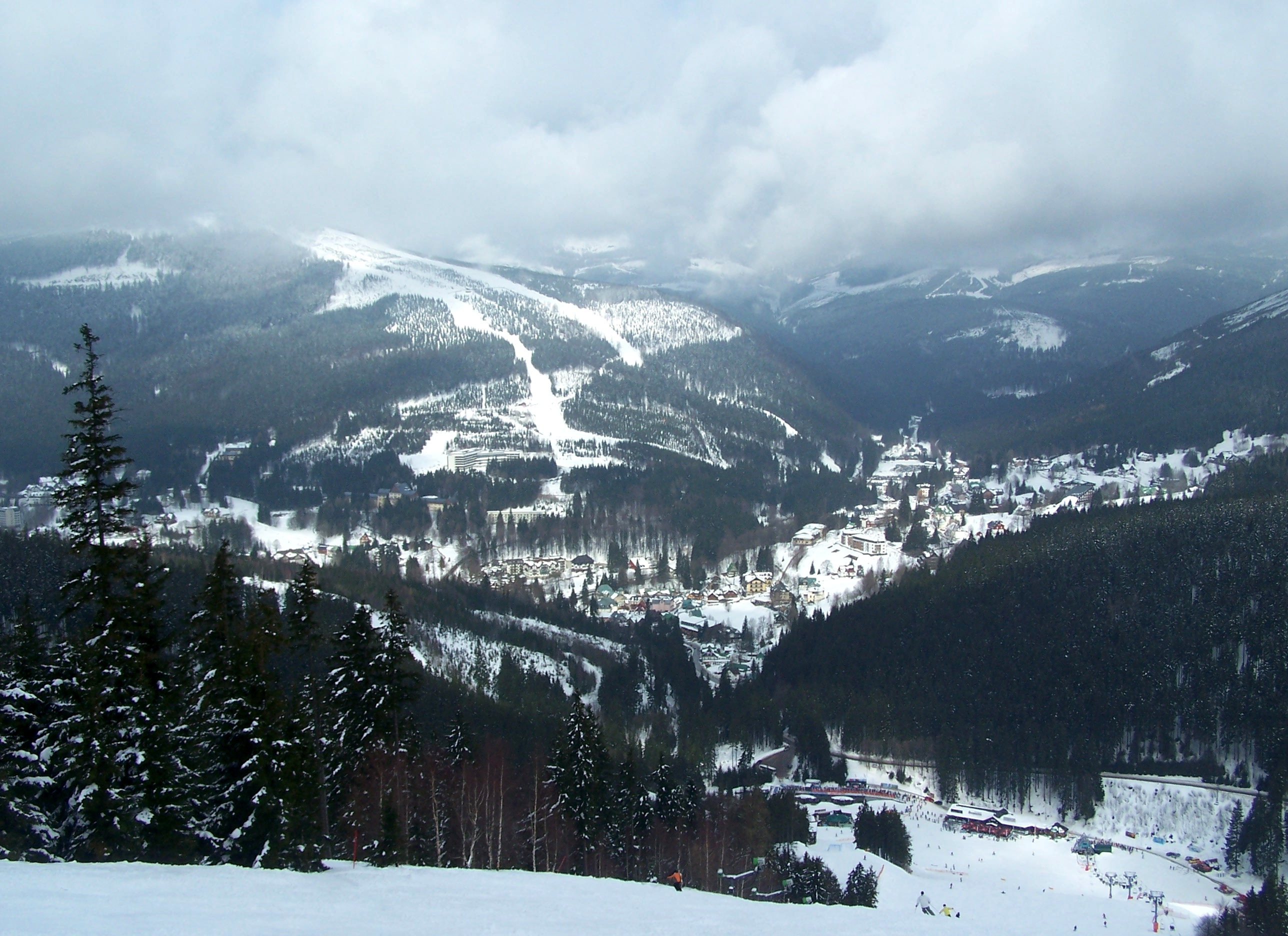 Špindlerův Mlýn (Spindlermühle) as seen from ski resort Svatý Petr